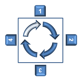 Reihenfolge der Spielansage beim Schafkopf